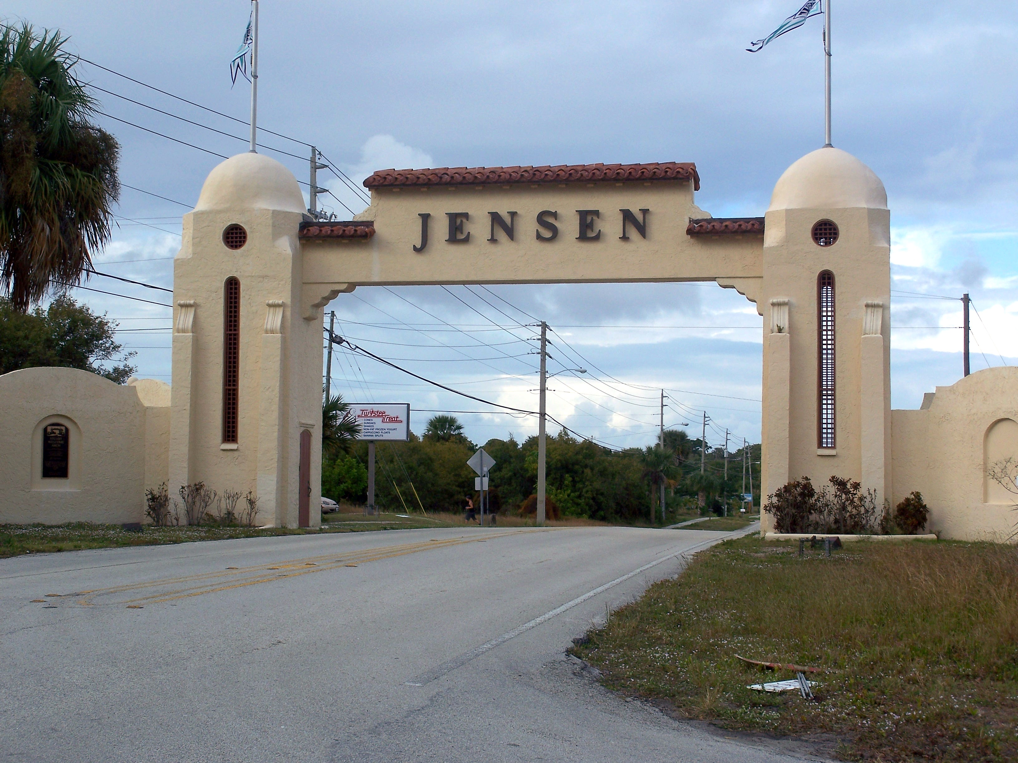 Jensen Beach, Florida: Stuart Welcome Arch